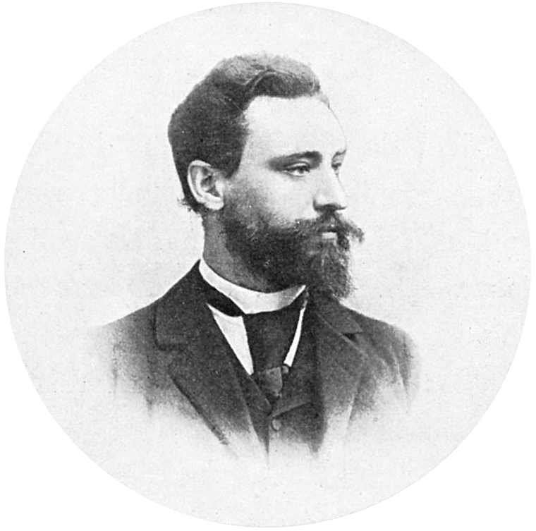 Architekt Karl Hoffacker als Mitglied des Geschäftsführenden Ausschusses der Gewerbe-Ausstellung.